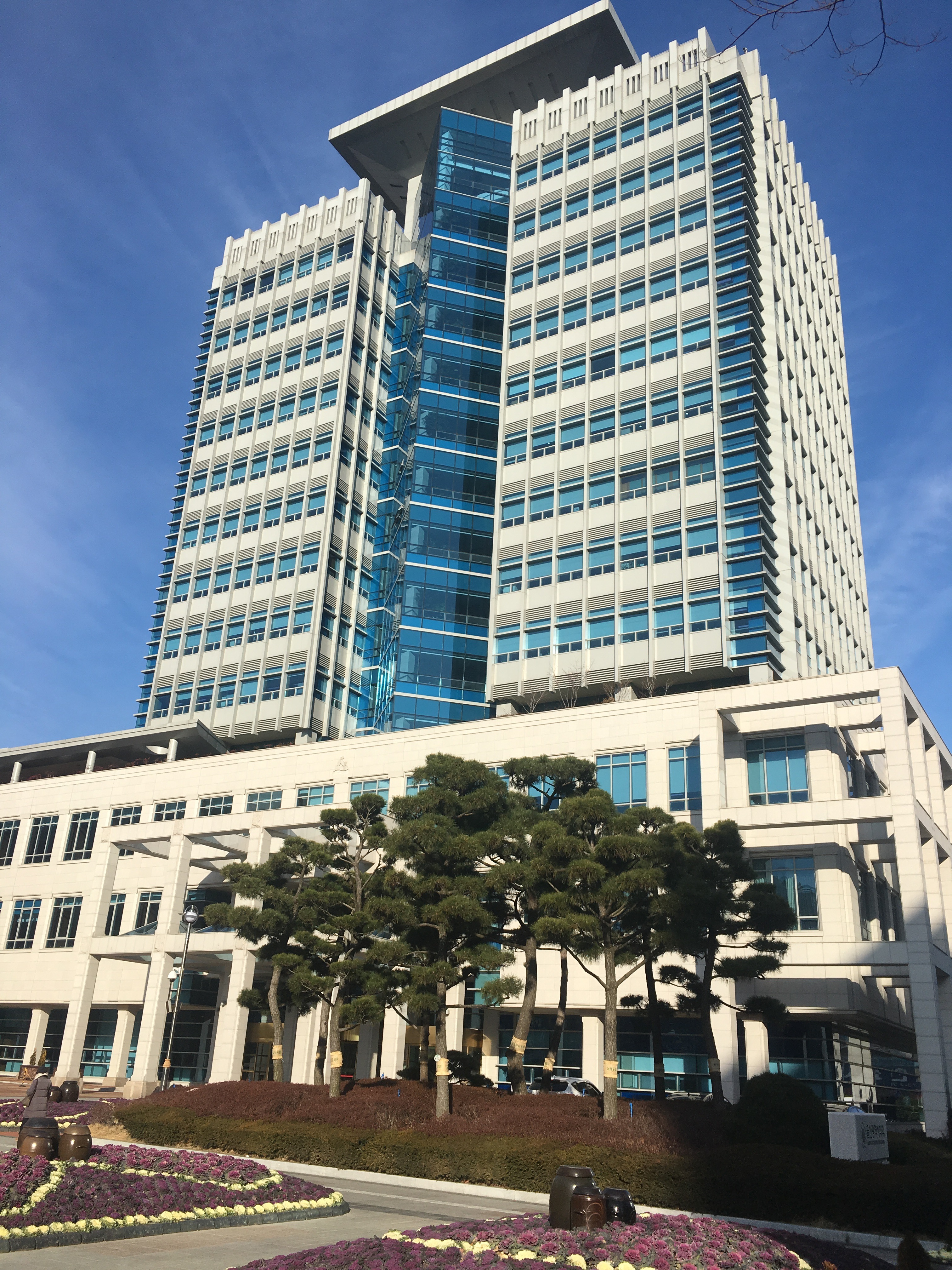 울산광역시청 신 청사